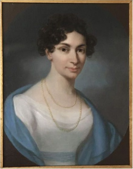 Портрет Соломеї Словацької